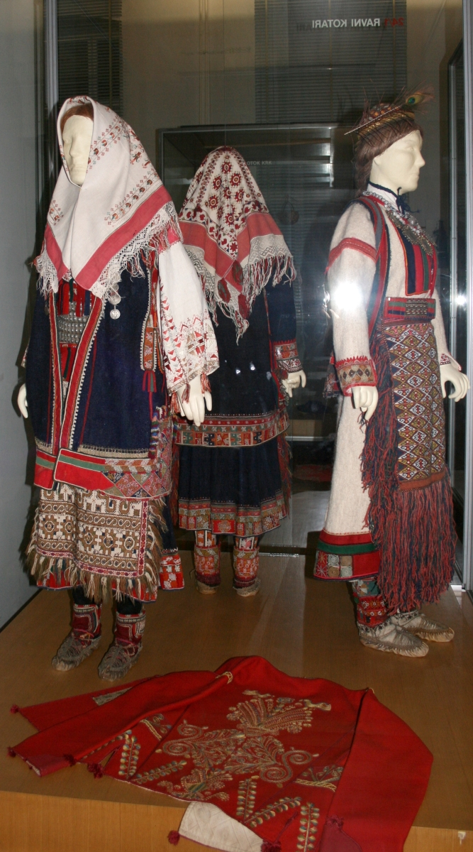 snimljeno tijekom Noći muzeja u Etnografskom muzeju u Zagrebu